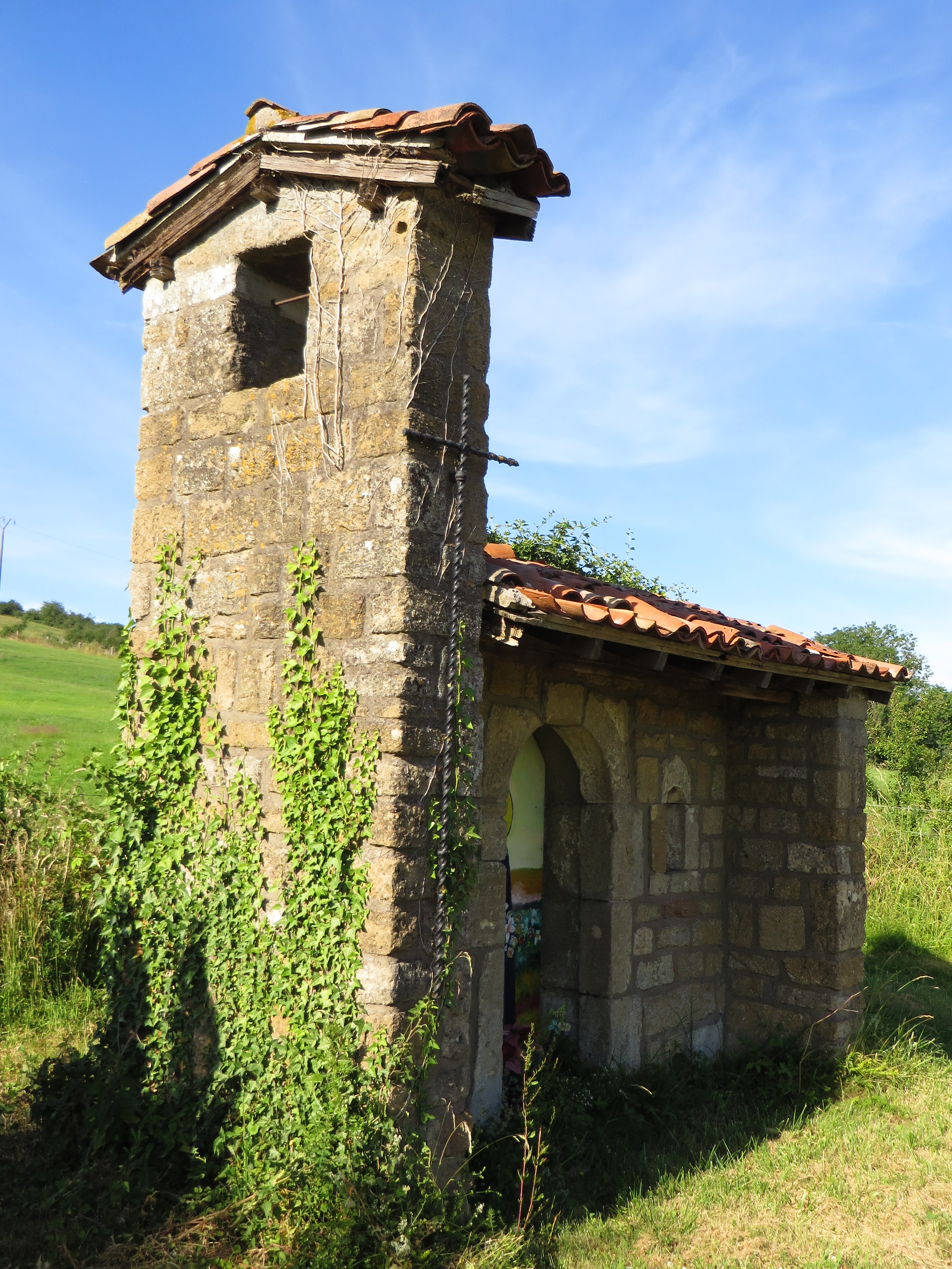 Verneuil-Grand La chapelle dédiée à la Vierge